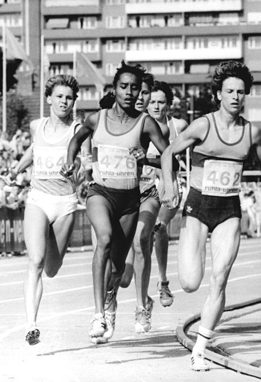 Sigrun Wodars, Yvonne Mai, Ellen Kießling ADN-ZB Häßler 23.6.89 Neubrandenburg: Leichtathletik-Sportfest um den "Vier-Tore-Pokal"- Jahresweltbestleistung im 800-m-Lauf erreichte Sigrun Wodars (r.) (SC Neubrandenburg) in 1:56,82 min. Yvonne Mai (SC Neubrandenburg) (2.v.l.) und Ellen Kießling (SC Einheit Dresden) (l.) erreichten die folgenden Plätze.